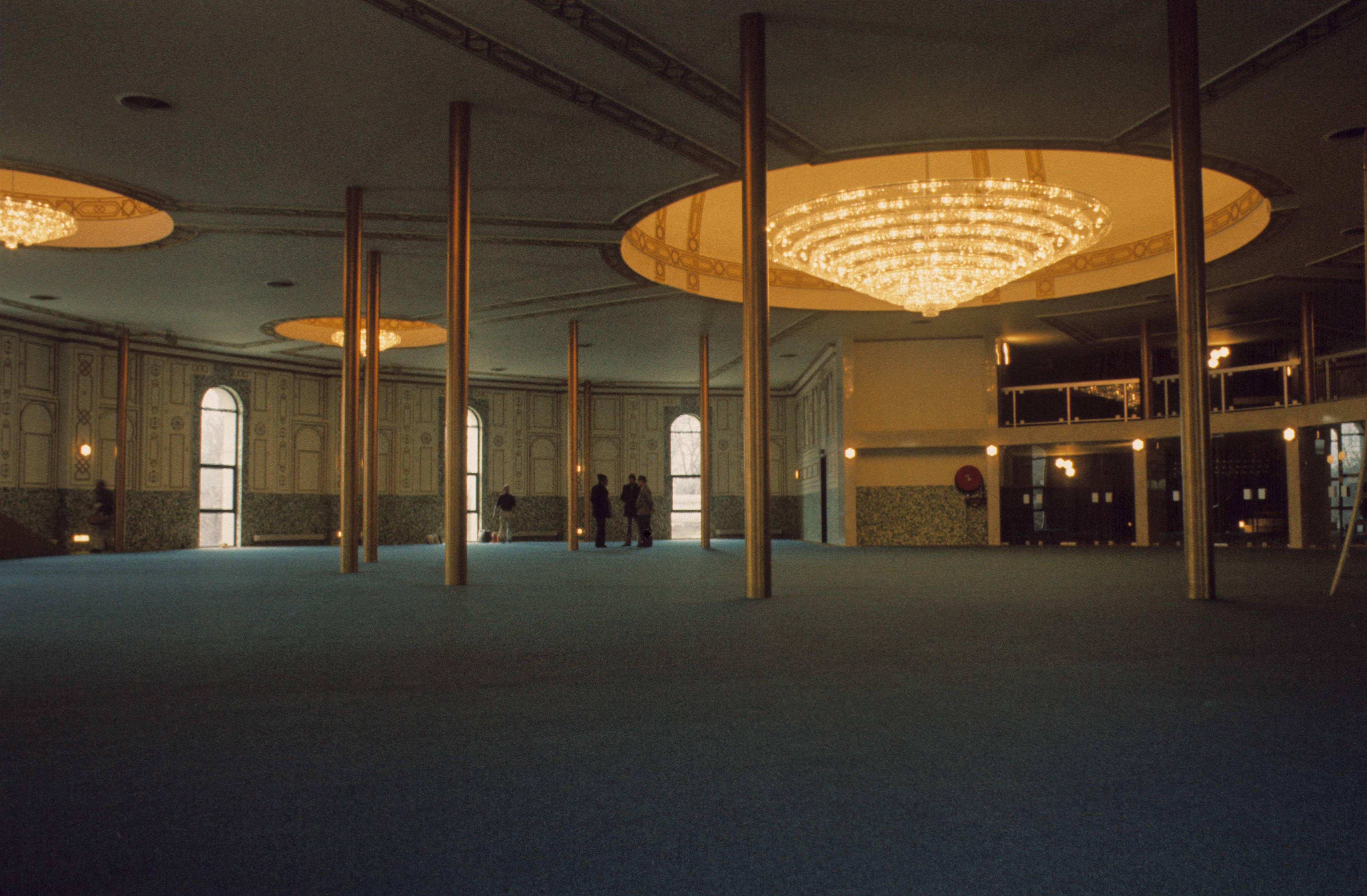 Intérieur de la mosquée de Bruxelles à la fin des travaux de rénovation